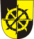 znak obce